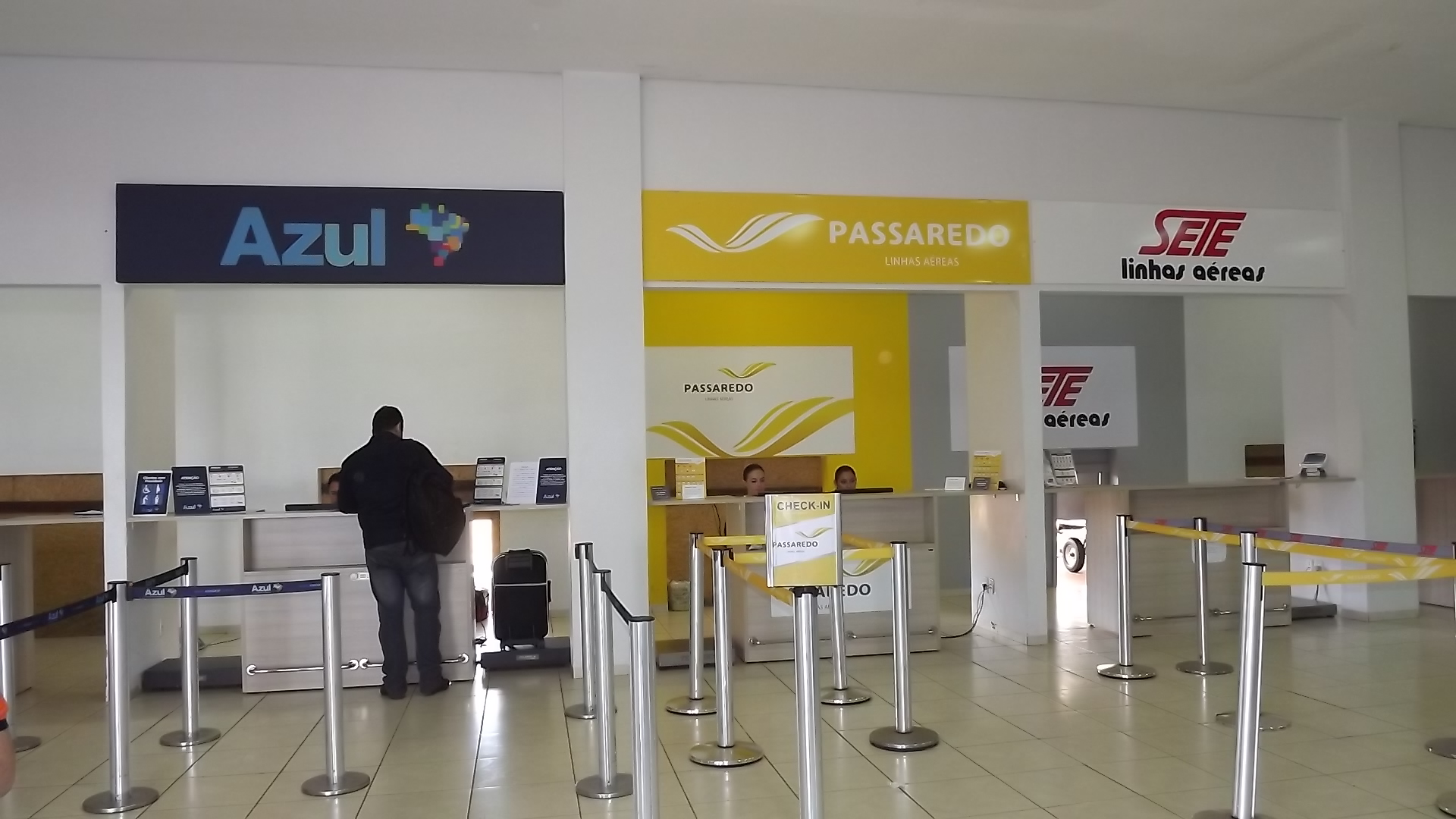 Português do Brasil: Balcões de check-in